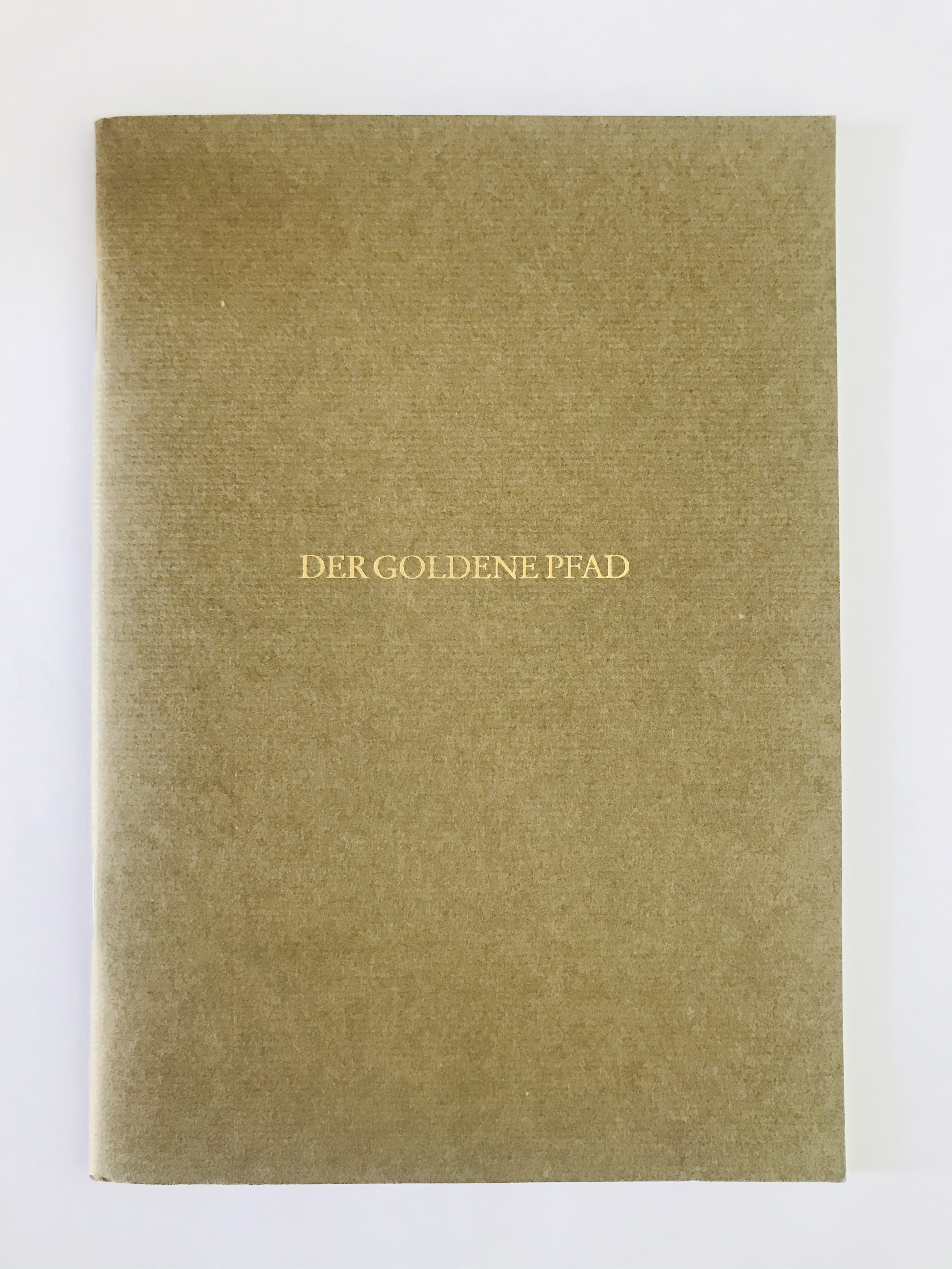 Buch zum 250. Todestag